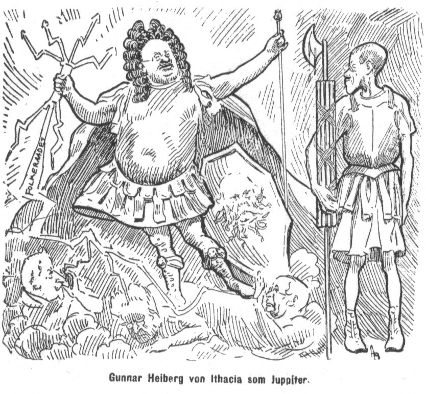 Gunnar Heiberg (til venstre) og Hjalmar Christensen. Karikatur av Andreas Bloch i «Korsaren» 1897.